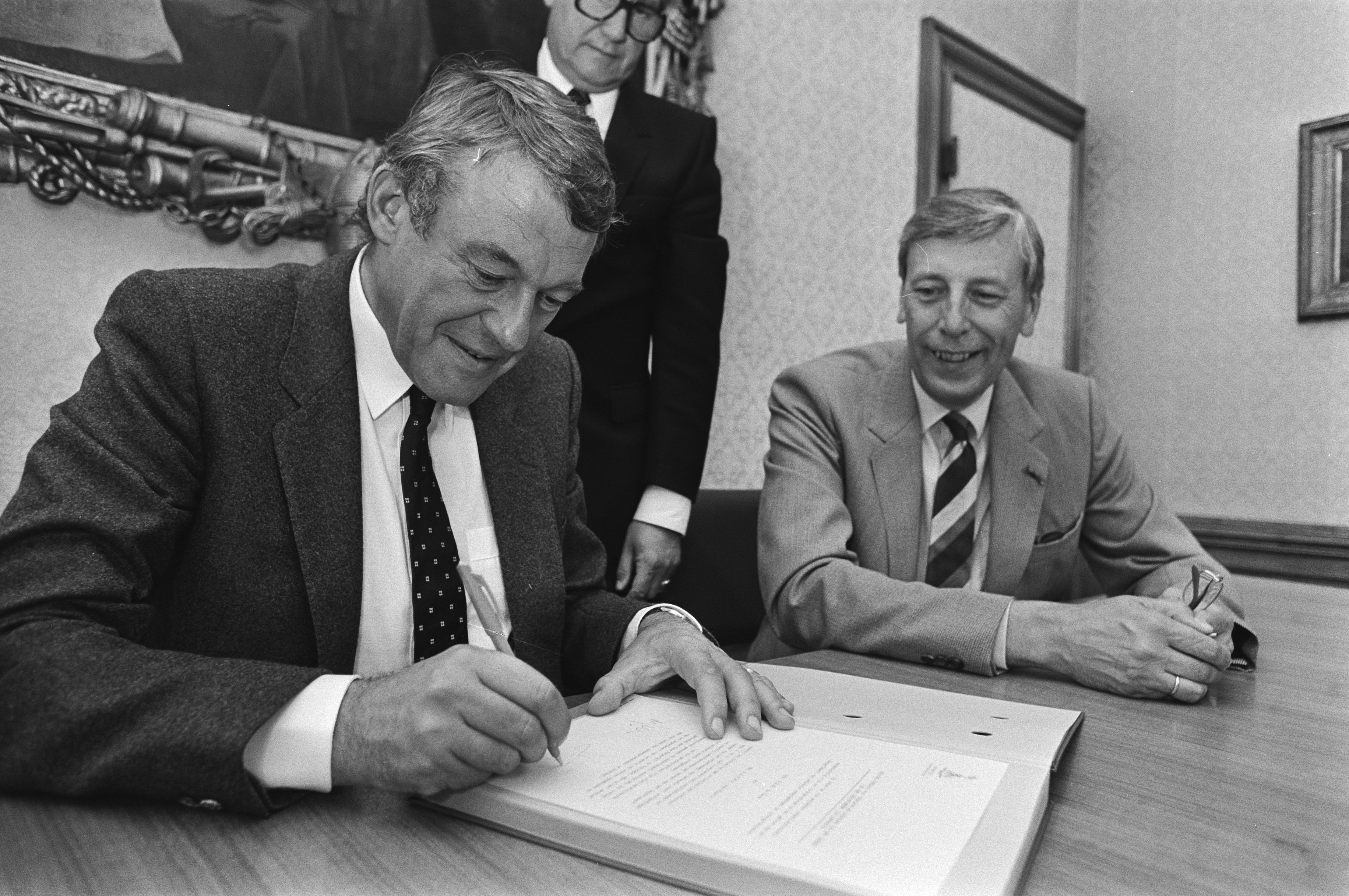 Collectie / Archief : Fotocollectie Anefo Reportage / Serie : [ onbekend ] Beschrijving : Overname van de ministeries. Hans van Mierlo tekent voor de overname van het ministerie van Defensie, rechts oud minister Pieter de Geus Datum : 11 september 1981 Locatie : Den Haag, Zuid-Holland Trefwoorden : handtekeningen, ministeries, ministers Persoonsnaam : Geus, P.B.R. de, Mierlo, Hans van Fotograaf : Bogaerts, Rob / Anefo, [onbekend] Auteursrechthebbende : Nationaal Archief Materiaalsoort : Negatief (zwart/wit) Nummer archiefinventaris : bekijk toegang 2.24.01.05 Bestanddeelnummer : 931-6752